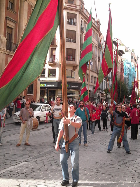 Pendones de León. Fiesta de San Froilán del 2006.